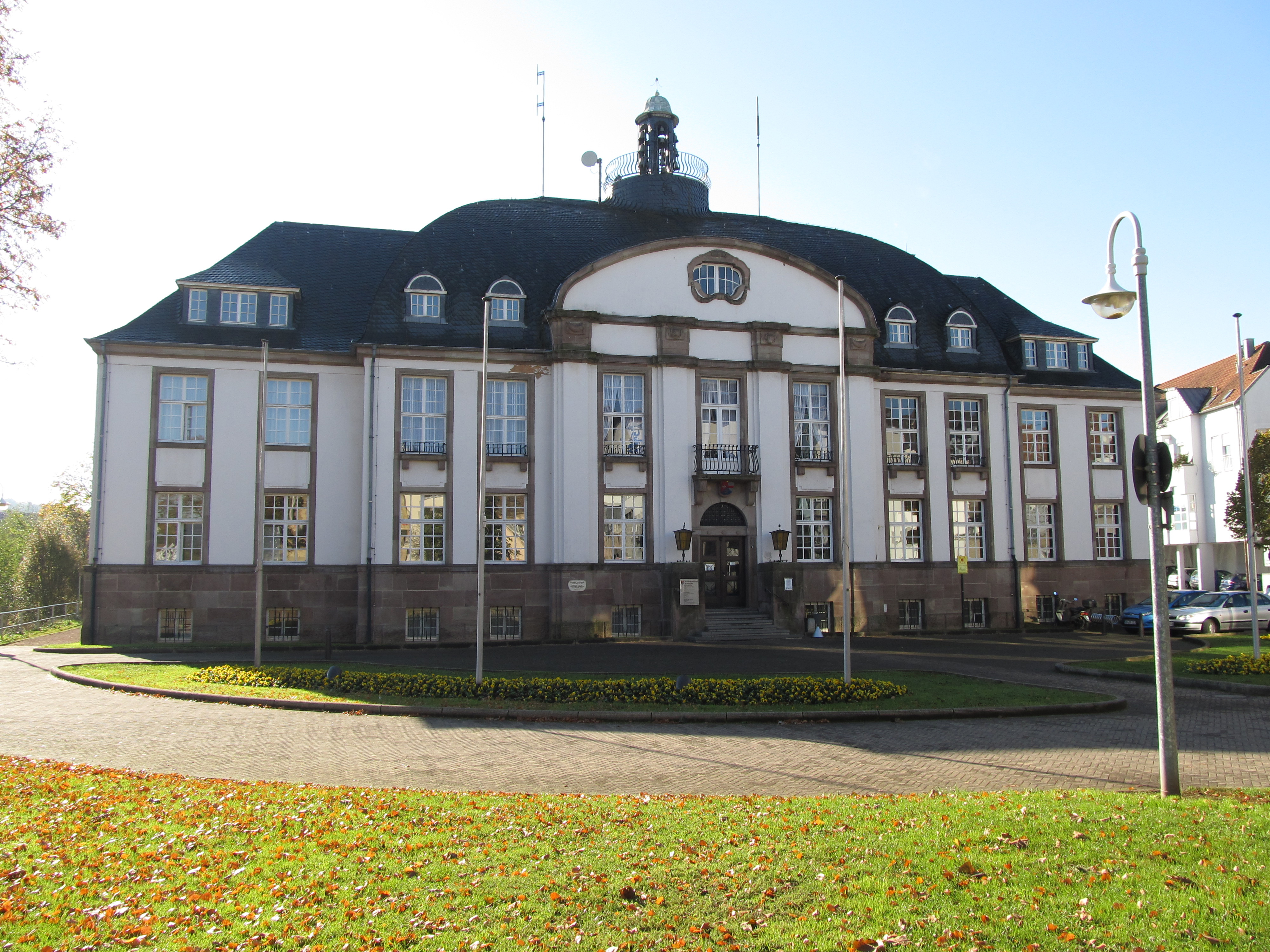 Rathaus von Püttlingen, Saarland